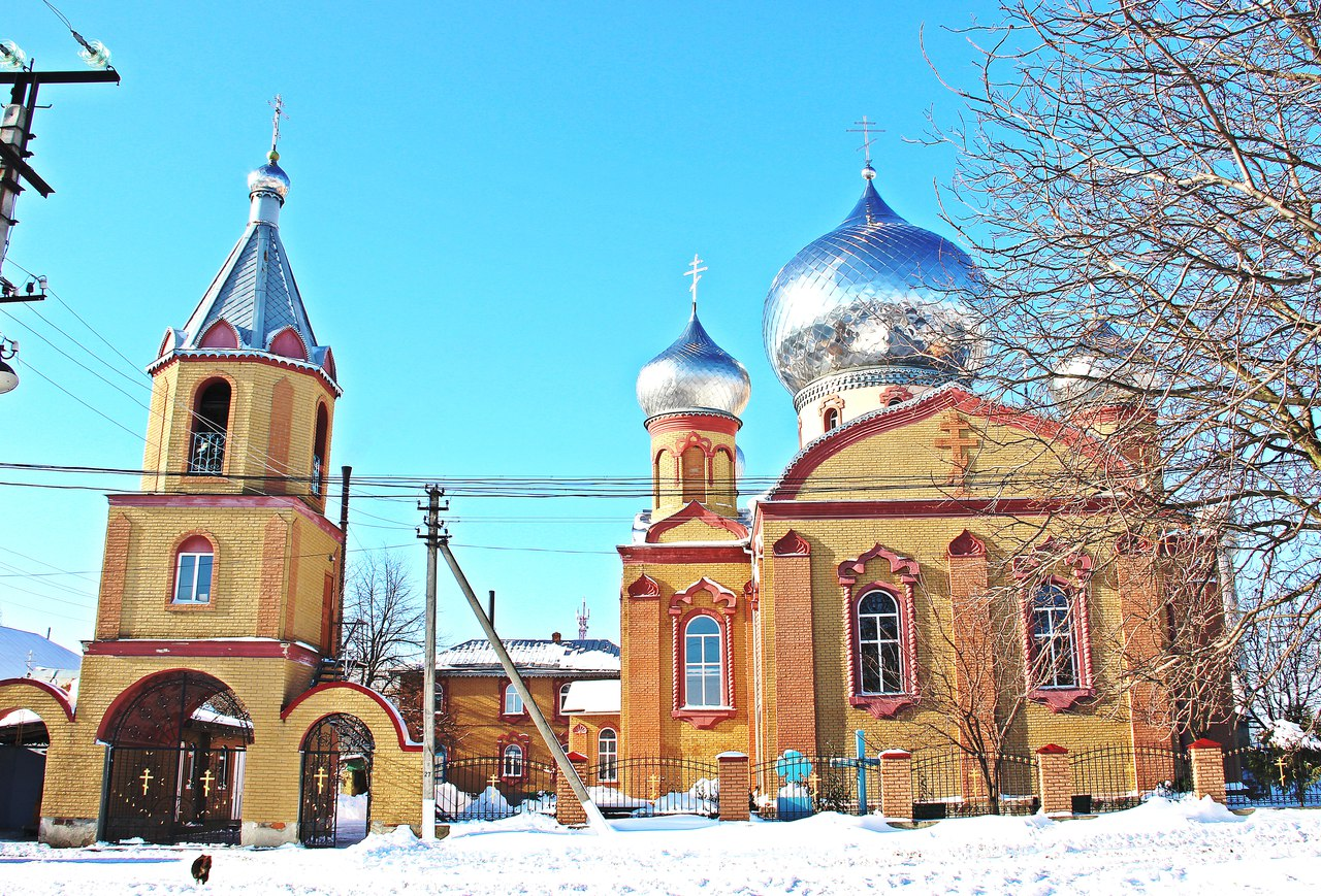 Спасо-Кресто-Воздвиженский храм